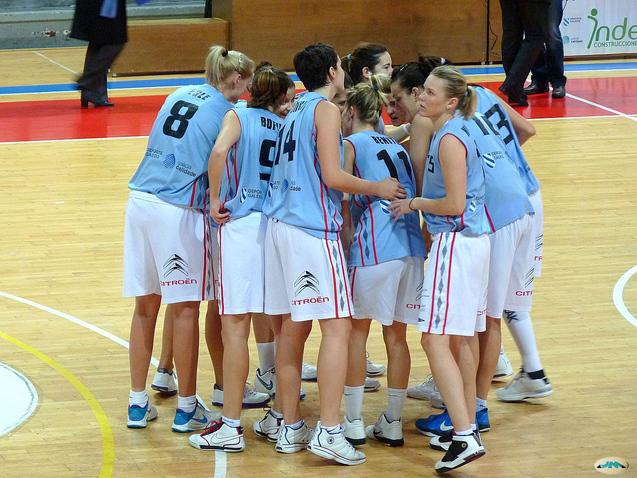 Piña das xogadoras do RC Celta de baloncesto.